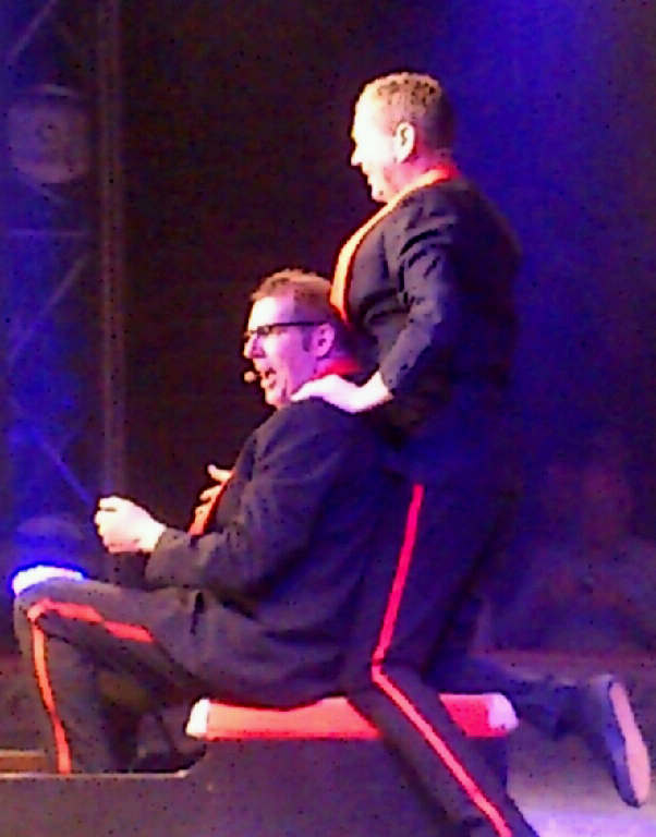 Peter Frödin i Zirkus Nemo sammen Søren Østergaard